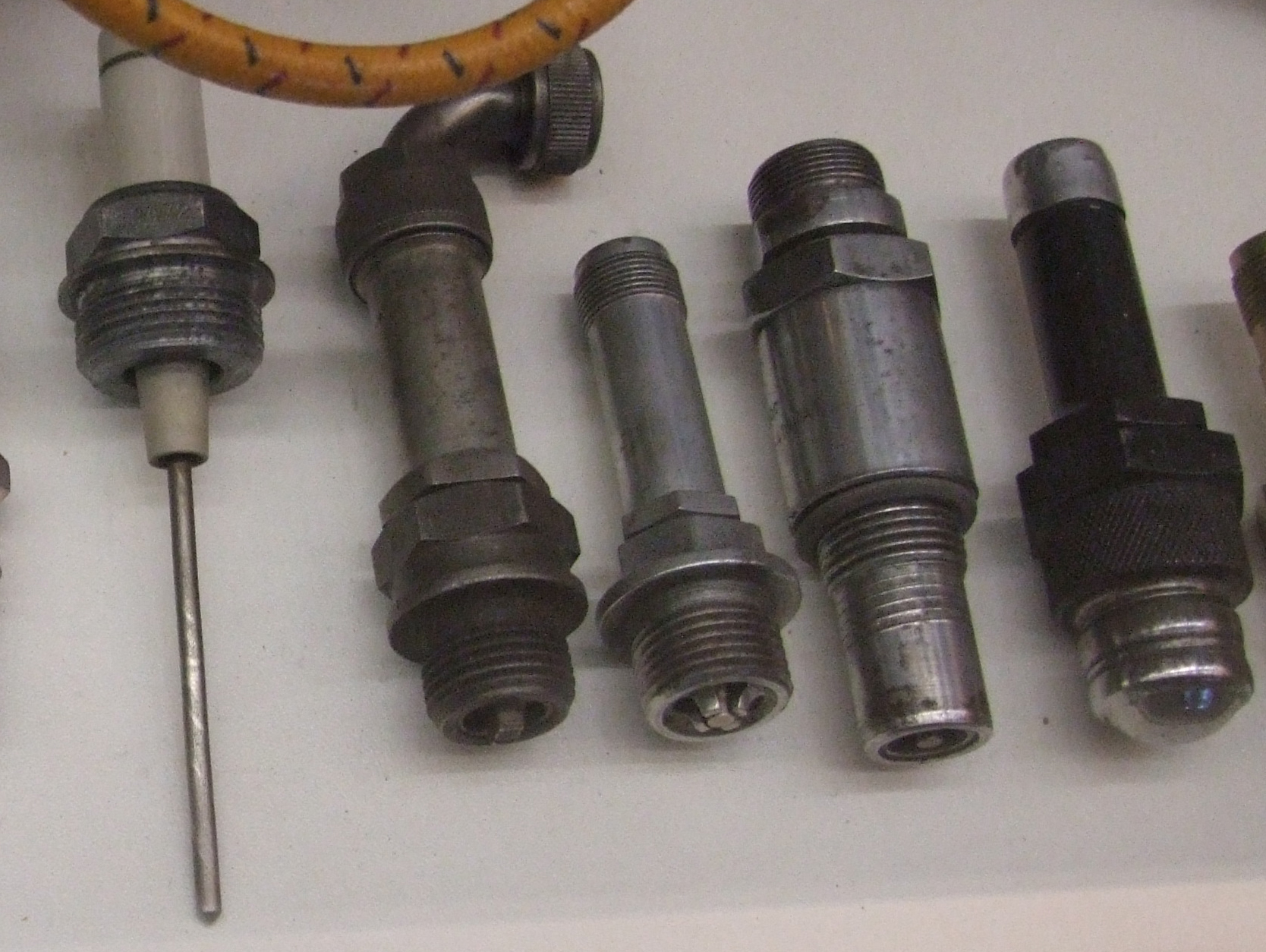 Sammlung historischer Zündkerzen, Teil 4, Museum Autovision, Altlußheim